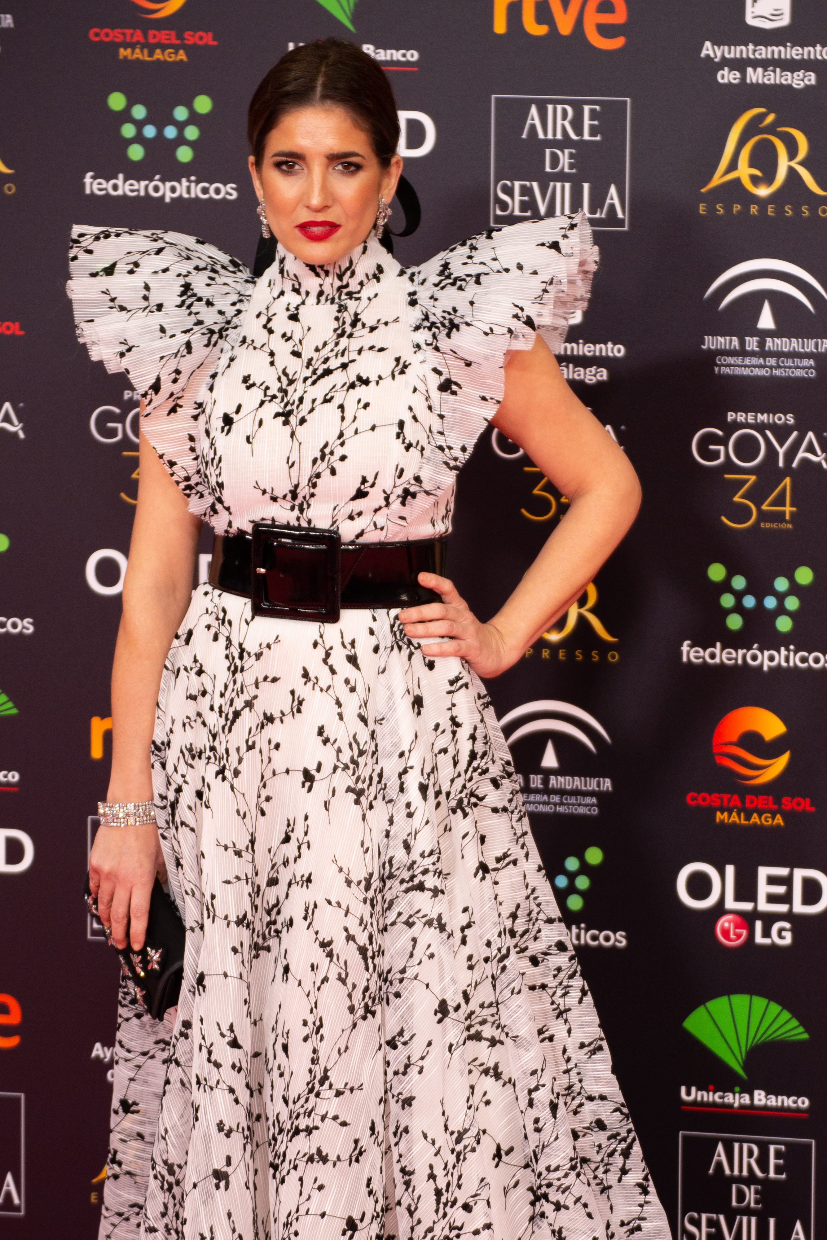 Lucía Jimenez en la alfombra roja de la ceremonia de entrega de los Premios Goya 2020 celebrada en Málaga